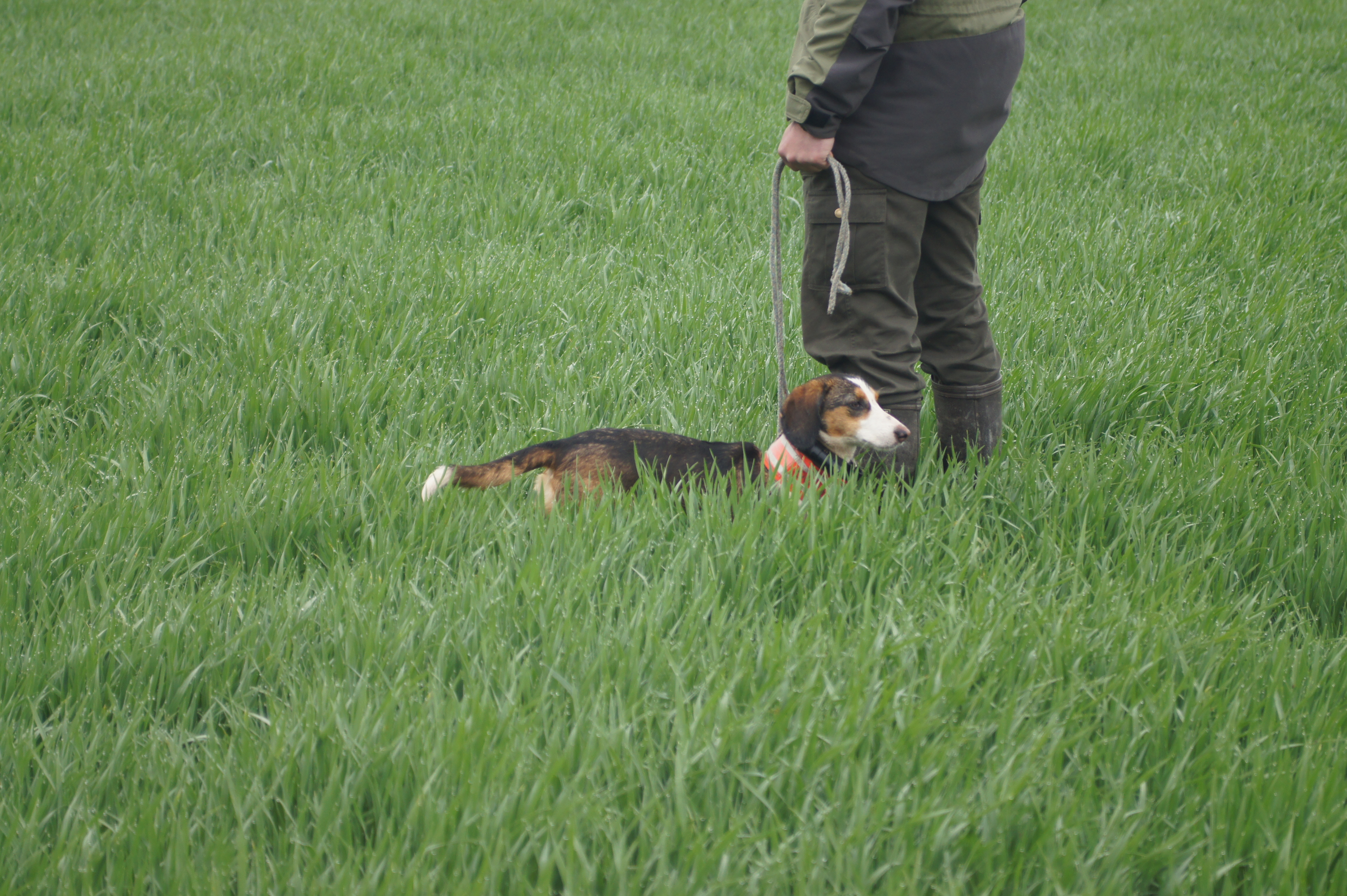 Anlagenprüfung Westfälische Dachsbracke, Spurlautprüfung 2011